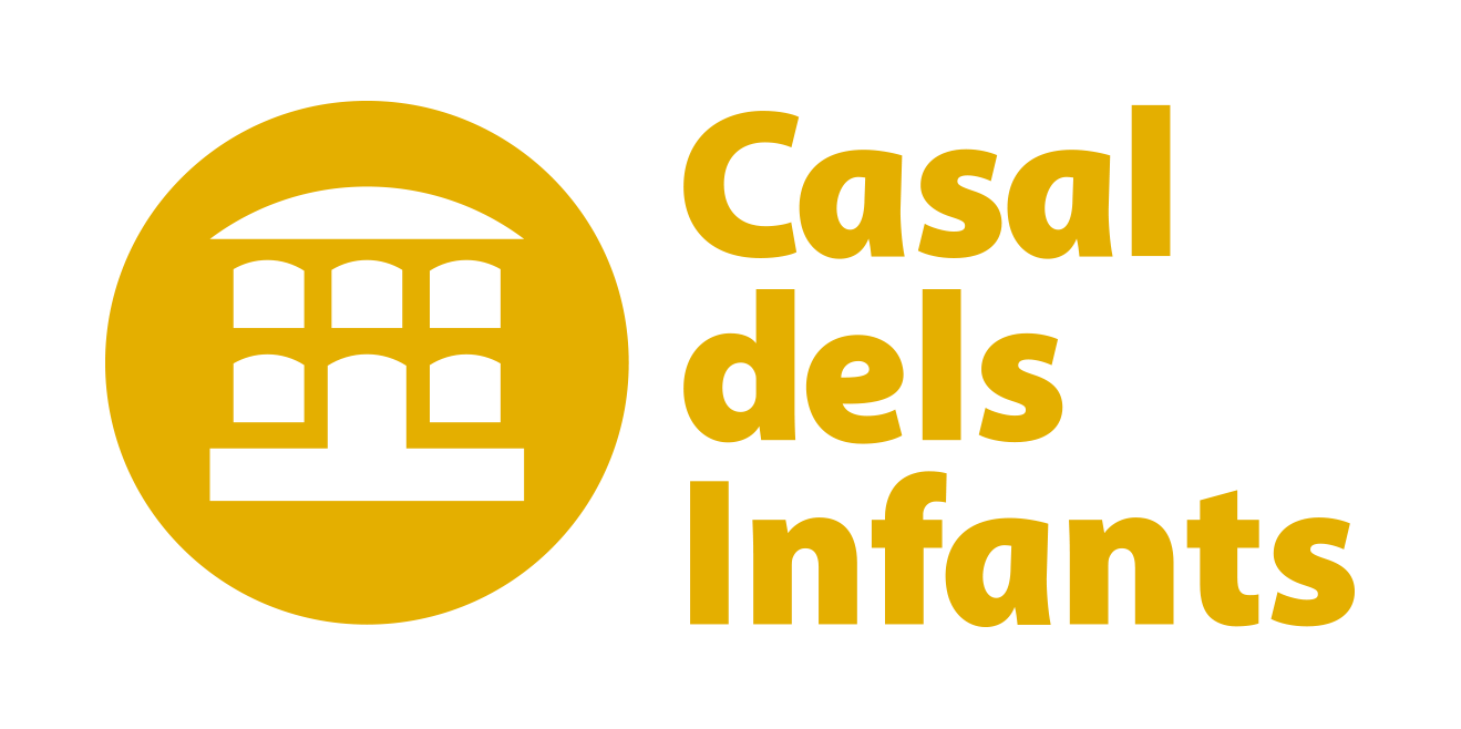 Logo Casal dels Infants